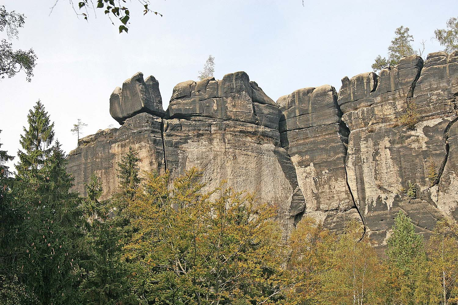 Blick auf den Berg Frienstein von dem Pfad zu den Kleiner Winterberg Autor: Prazak date: 11. 10. 2006